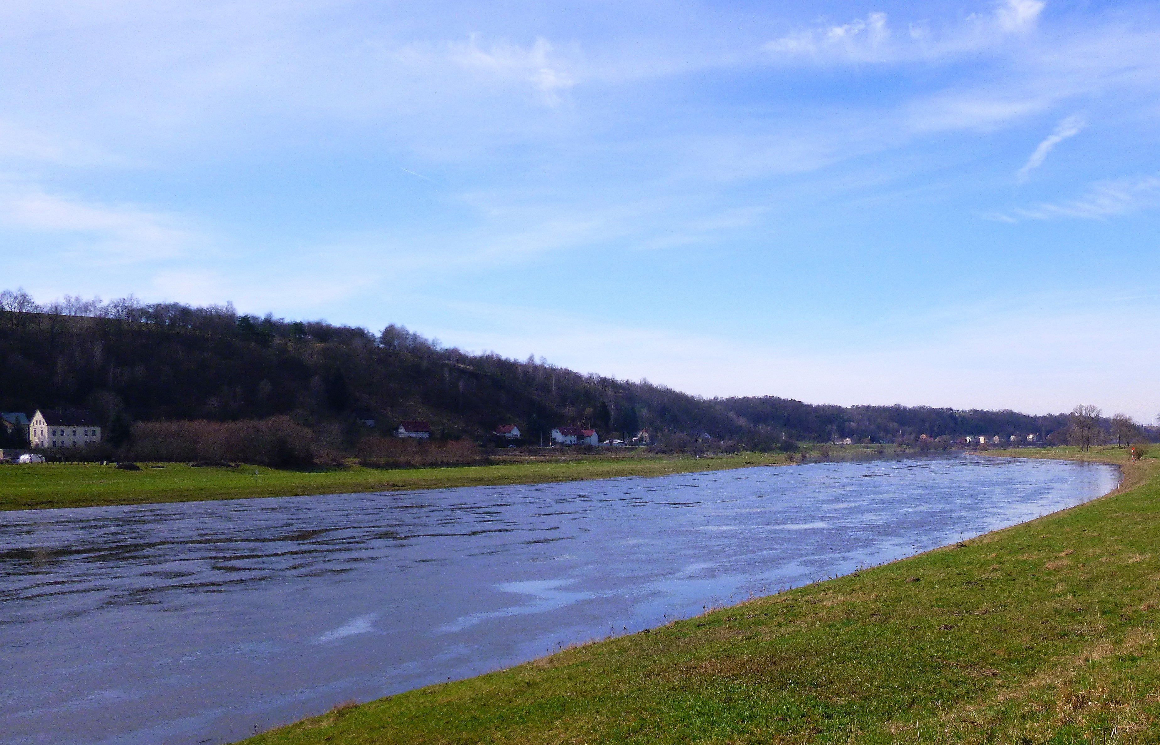 Elbaue 2017 in Karpfenschänke